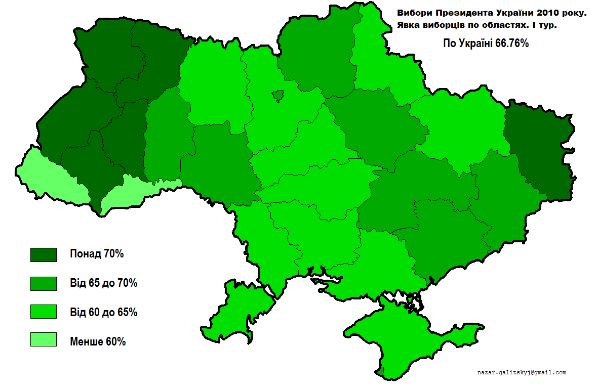 Явка виборців на виборах Президента України 2010 І тур